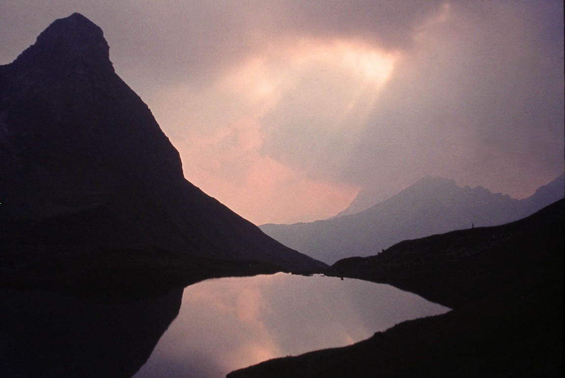 Rappensee in der Abendsonne